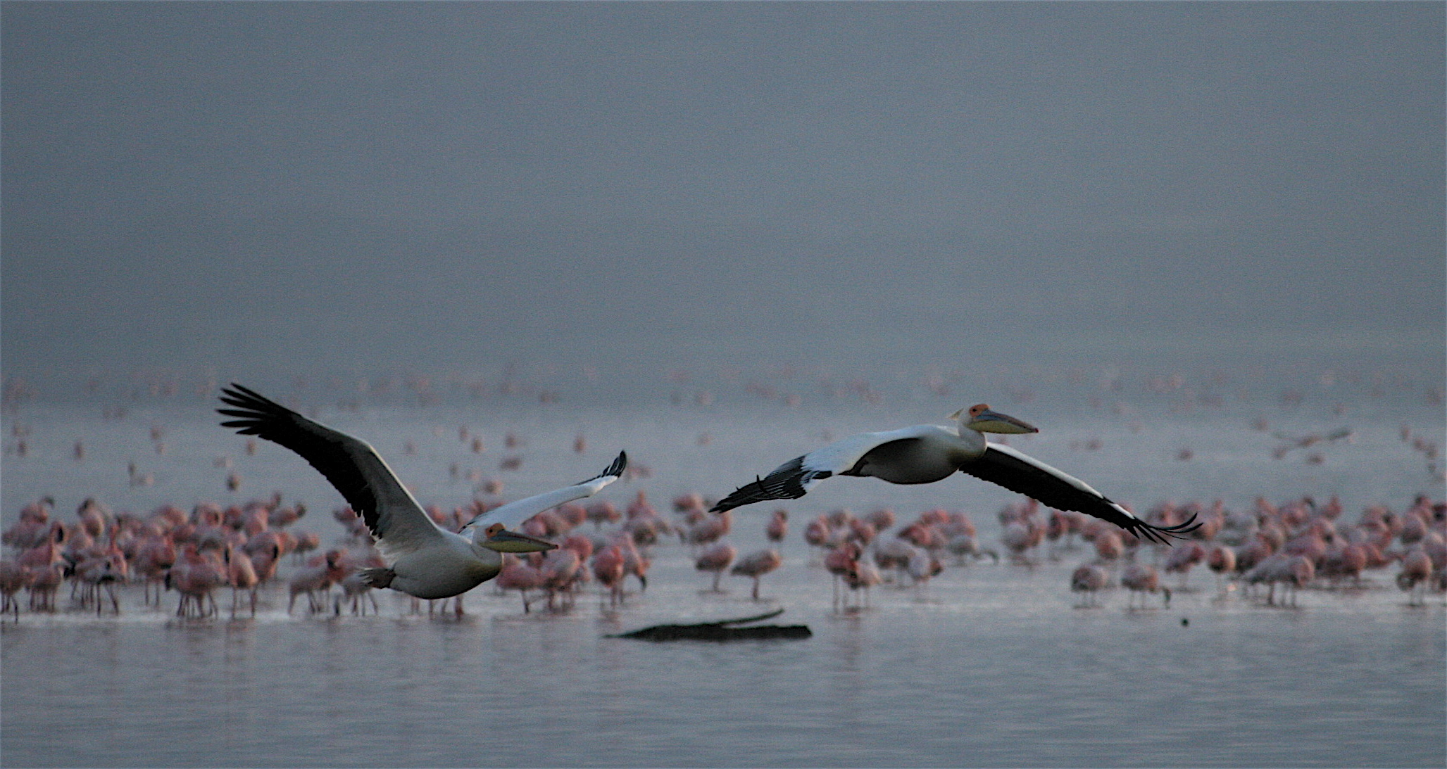 Pelicans flying at dawn. Lake Nakuru National Park, Kenya.